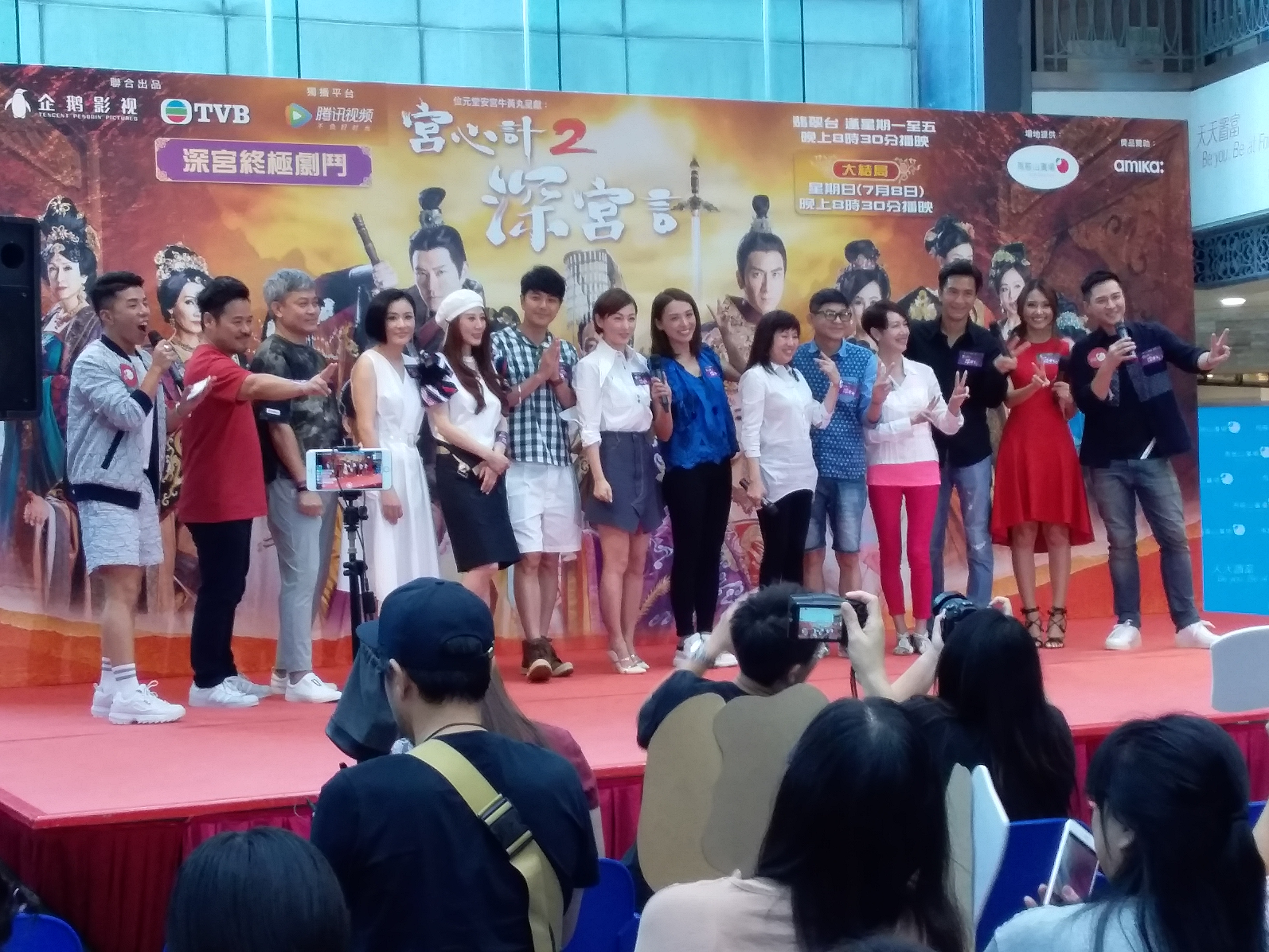 中文（香港）: （左二起）無綫電視古裝劇集《宮心計2深宮計》演員韋家雄、曾偉權、張文慈、康華、蕭正楠、劉心悠、陳煒、總監製梅小青、監製方俊華、演員謝雪心、馬國明、劉溫馨、朱滙林，於2018年7月2日到馬鞍山廣場出席「深宮終極劇鬥」宣傳活動。